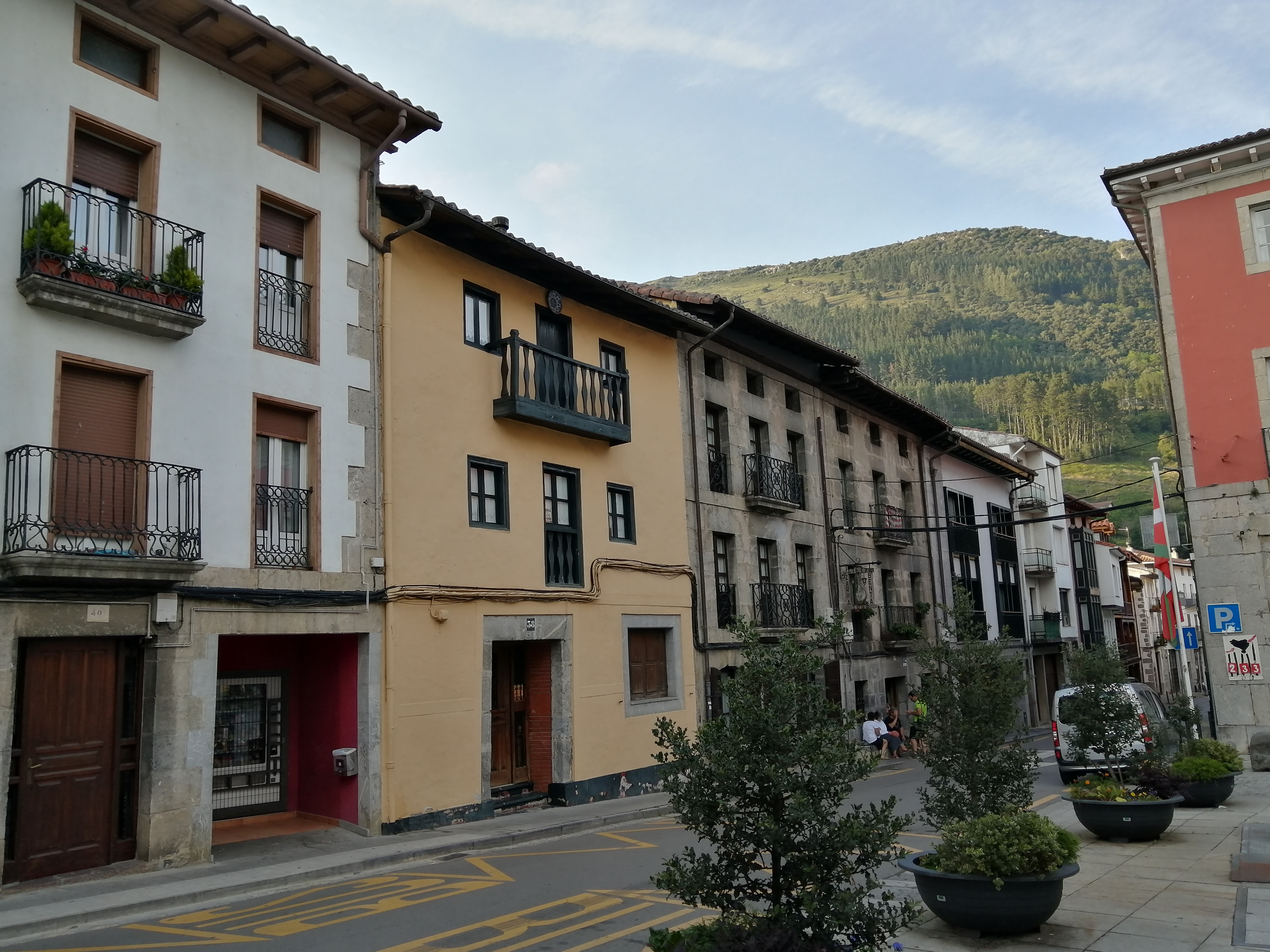 Aulestiko kale nagusia